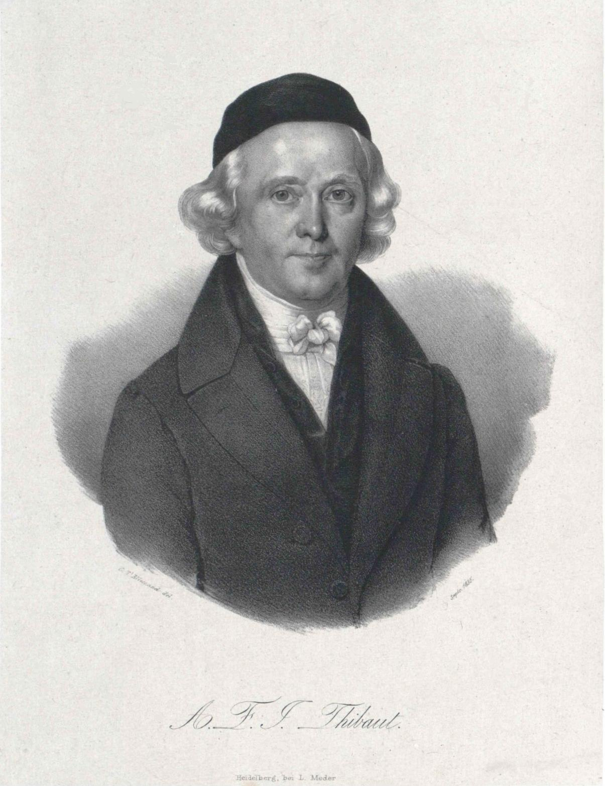 Anton Friedrich Justus Thibaut (1772-1840), German jurist